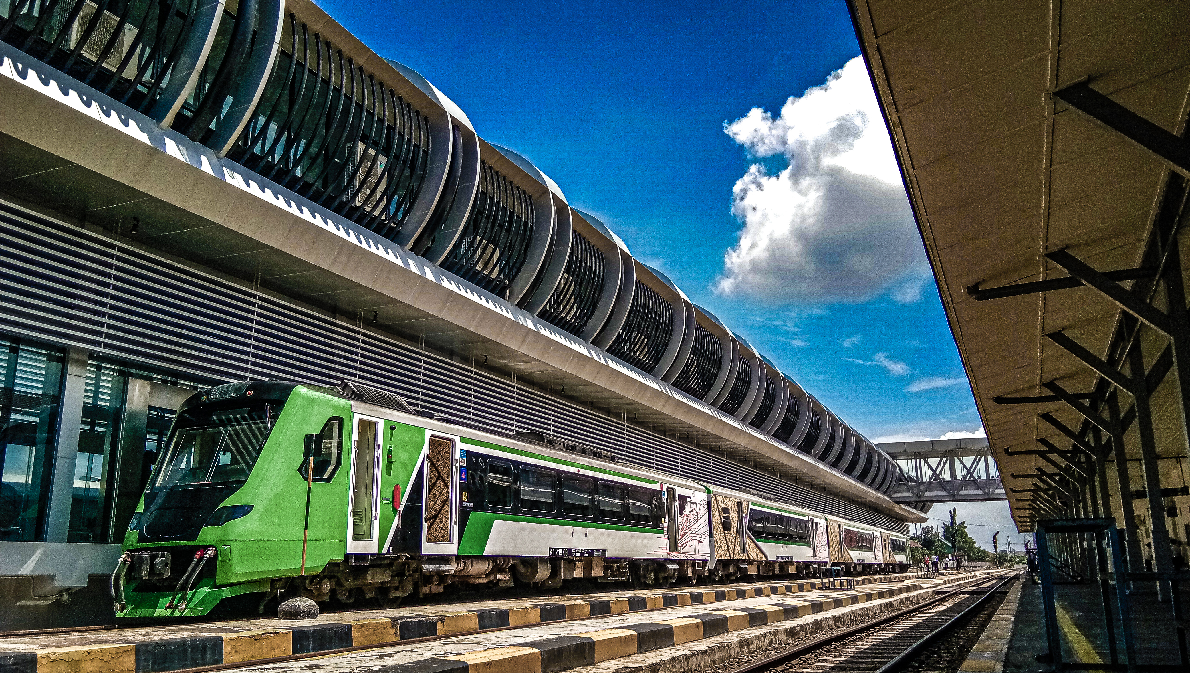 KA Bandar Adi Soemarmo sedang berhenti di Stasiun Bandara Solo Balapan